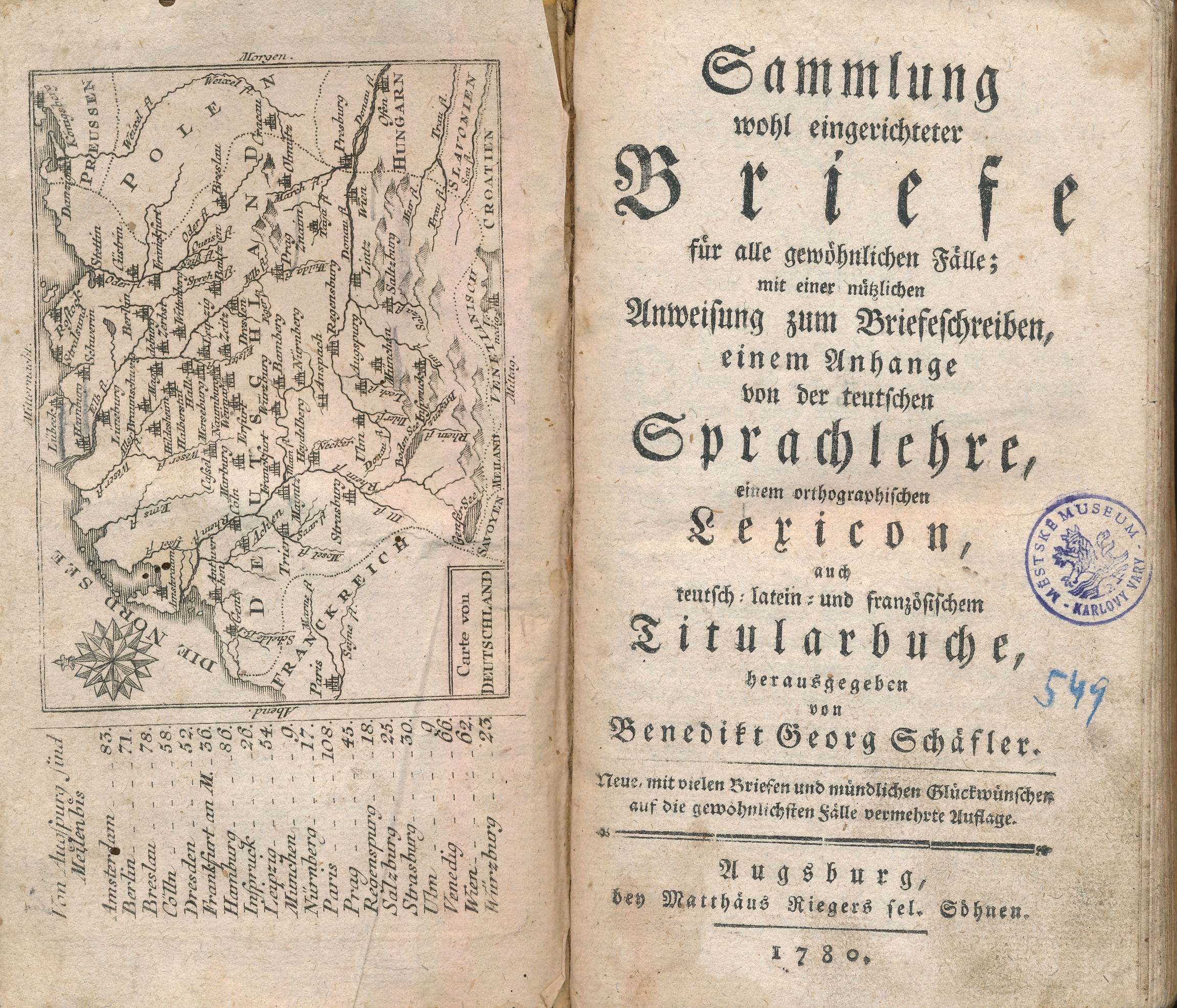 Briefsteller aus dem Jahre 1780 mit Sprachlehre, orthographischem Lexikon und Titularbuch